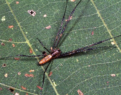 male Nephila clavata from Okinawa.